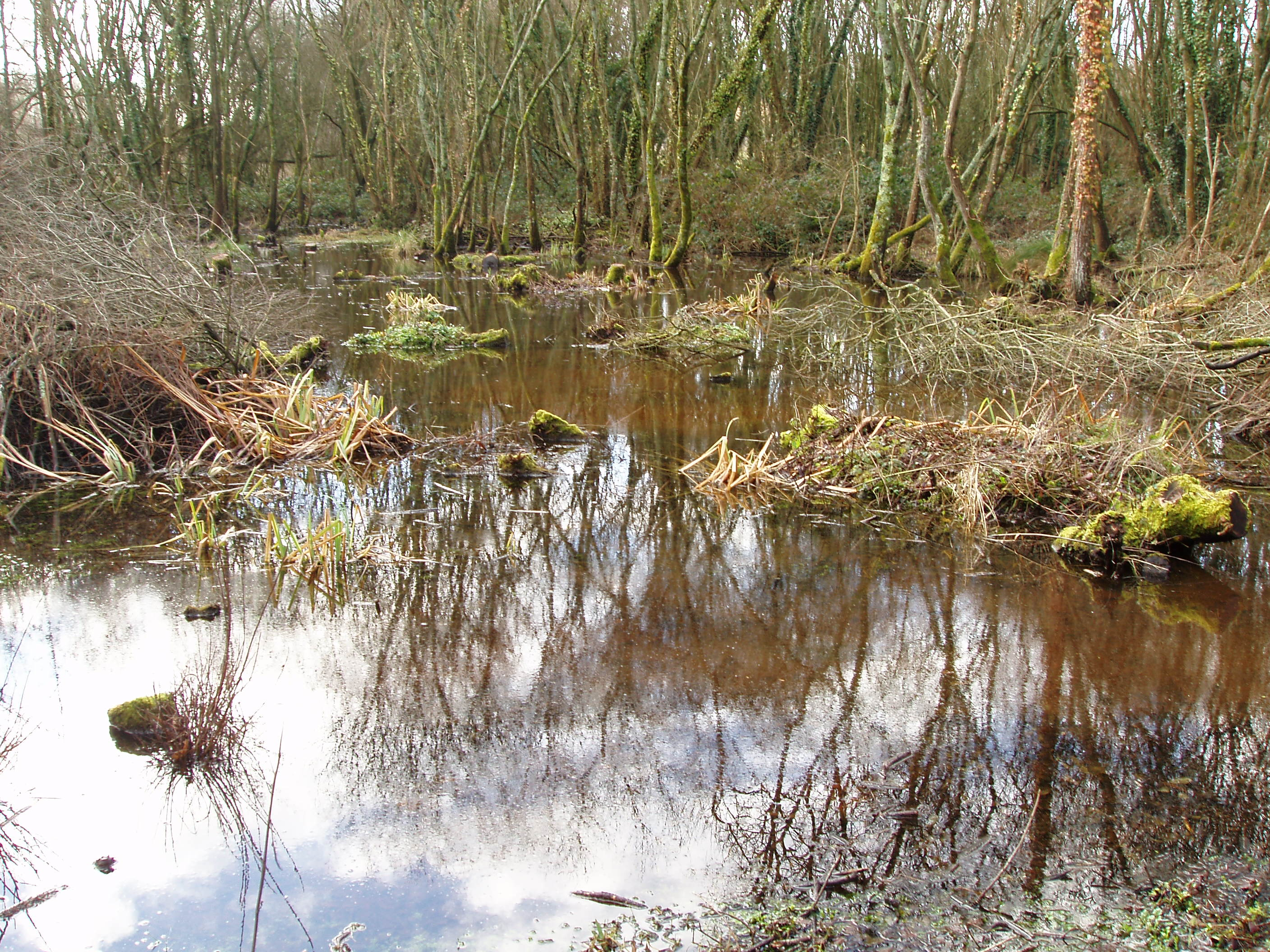 Saulaie humide du Val de Vilaine à Vitré